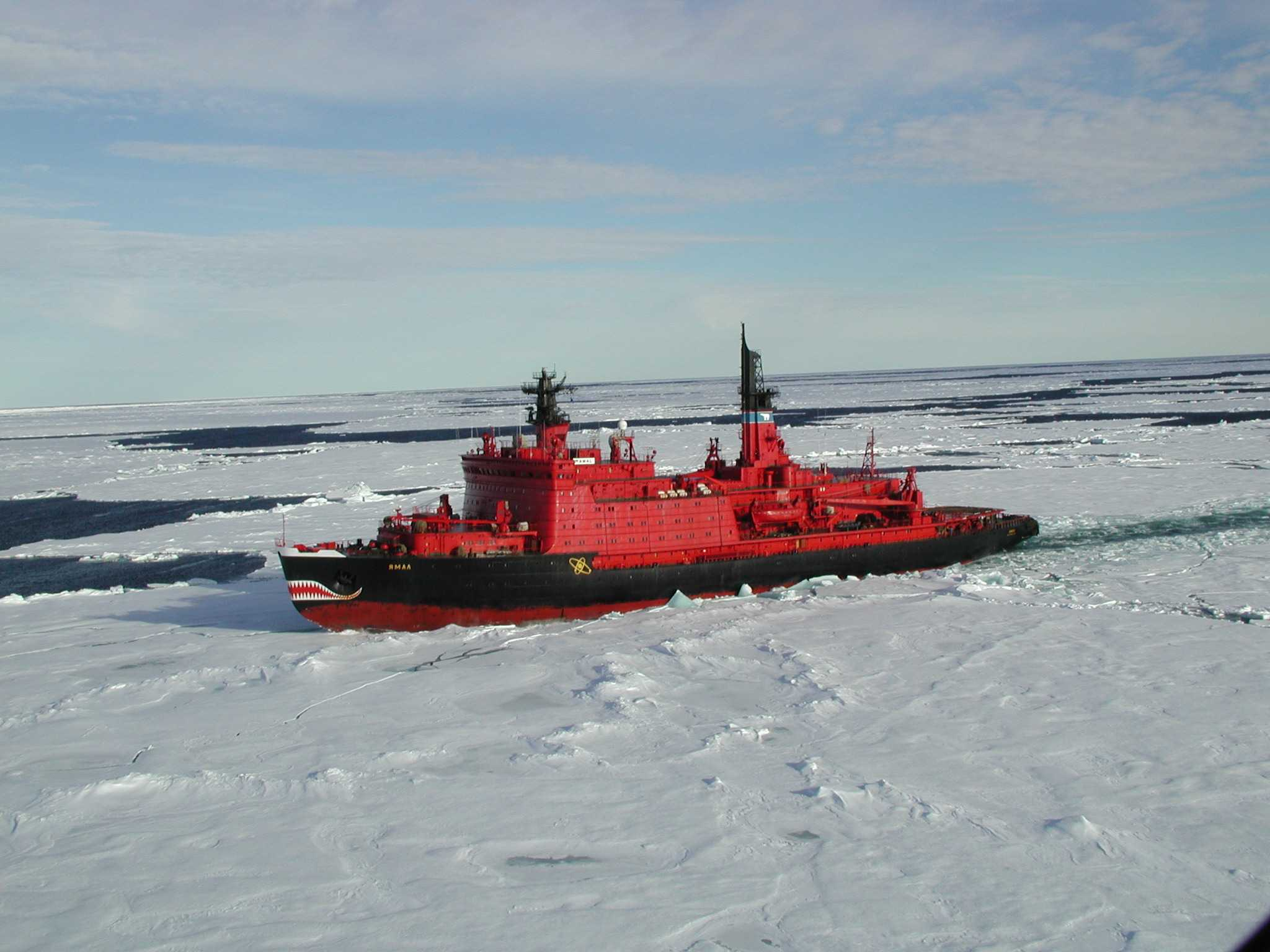 Атомный ледокол "Ямал". Вид с вертолёта.